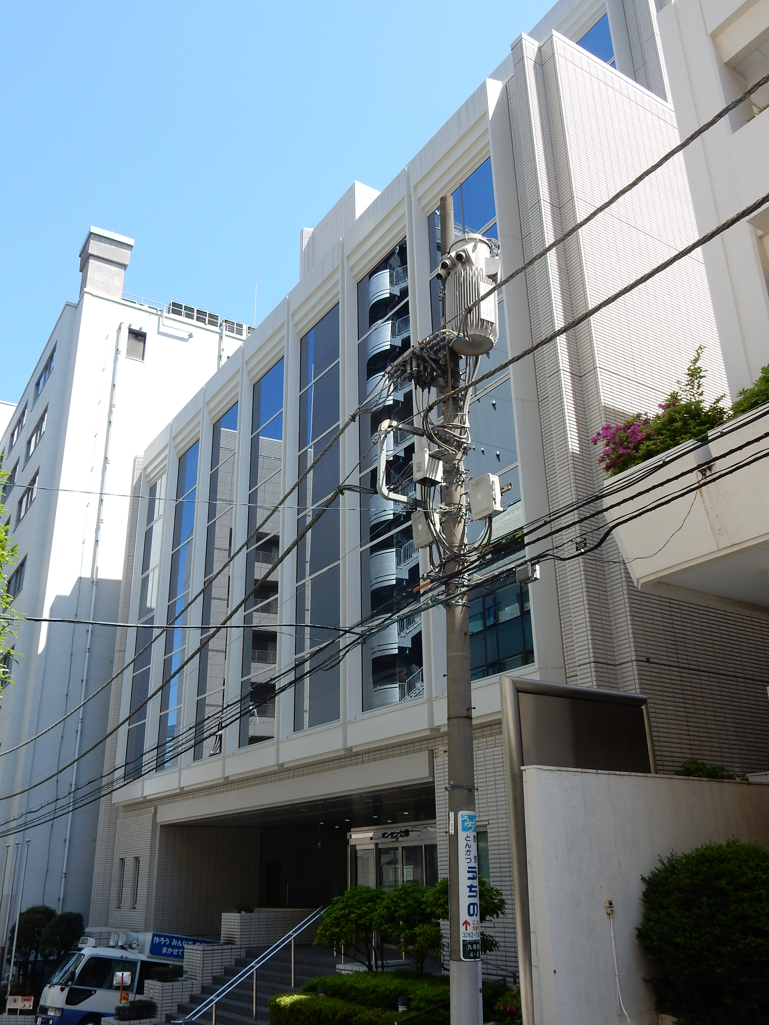 ゼンセン会館。東京都千代田区九段南4-8-16